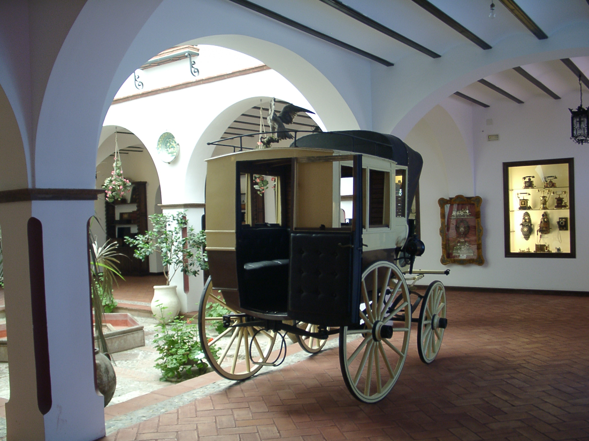 Ronda, Privatmuseum